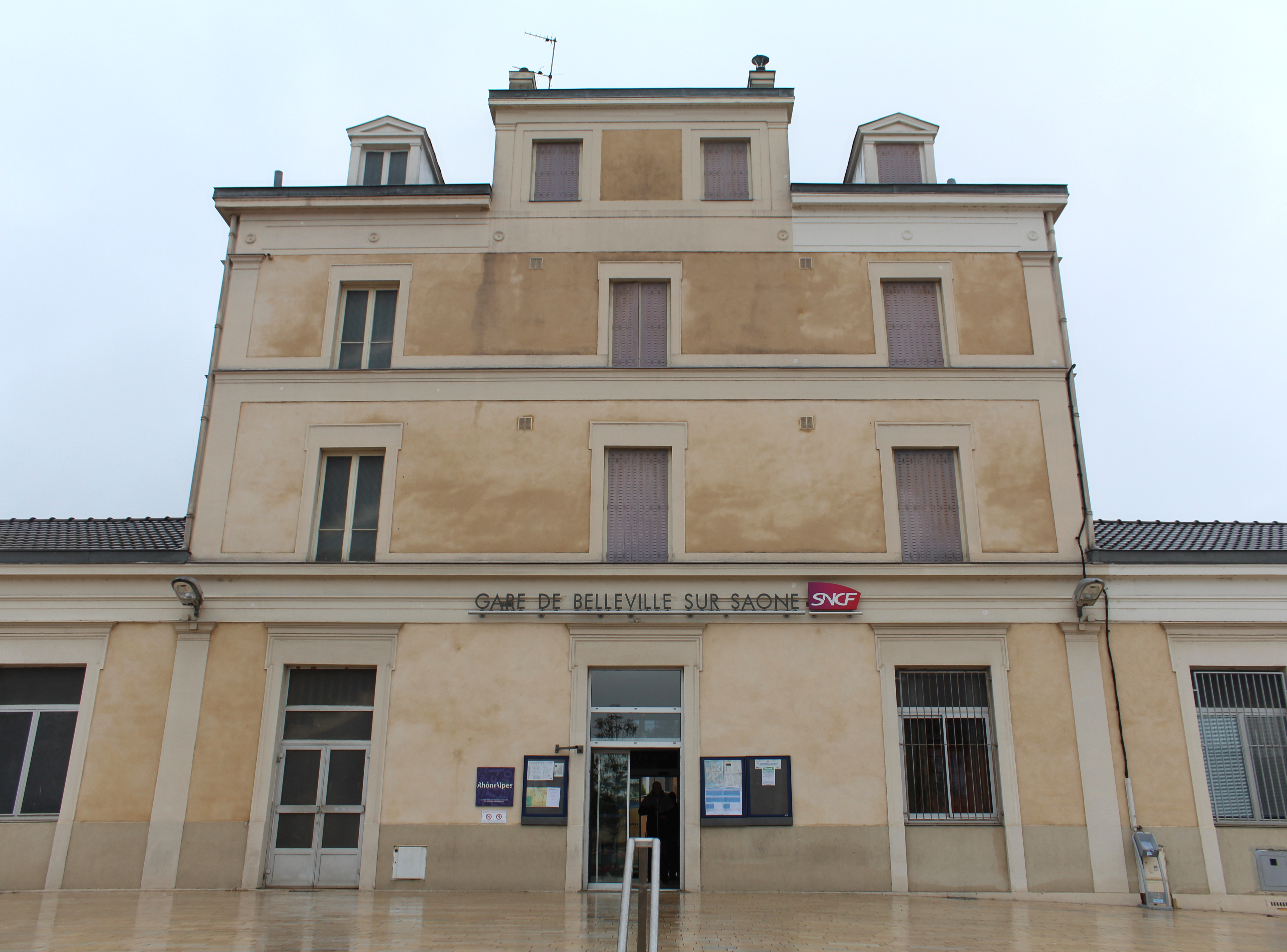 Gare de Belleville-sur-Saône, Belleville, Rhône.